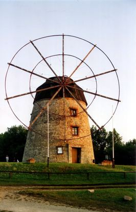 Eckartsberga - Holländer-Windmühle